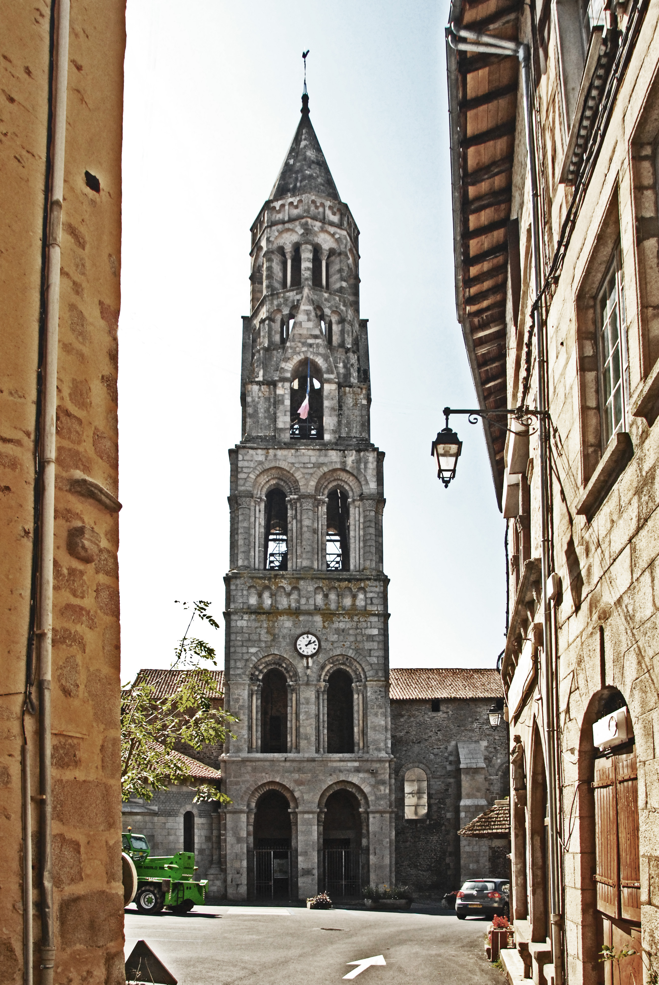 Stiftskirche St.-Léonard-de-Noblat, Glockenturm von N